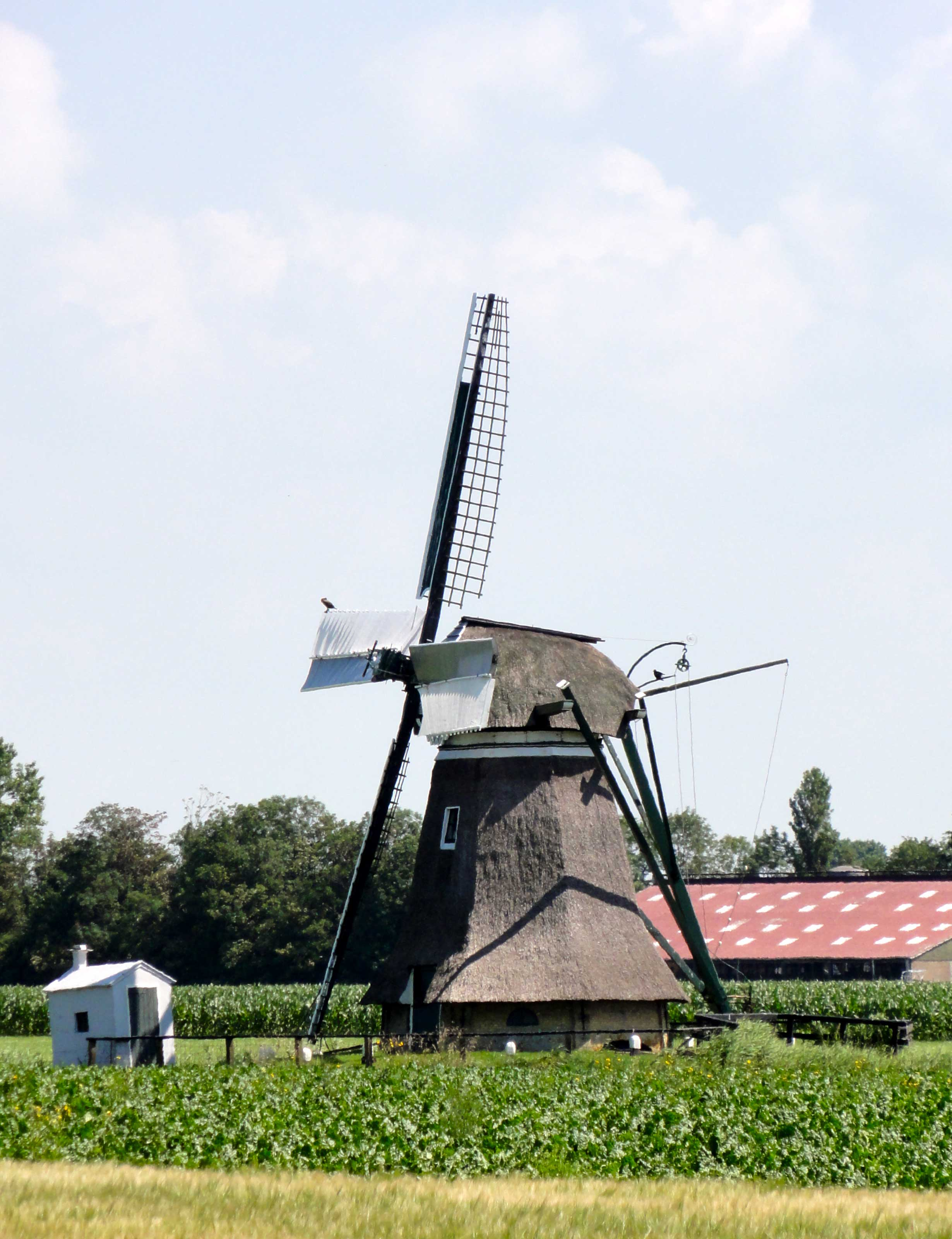 Poldermolen De Eendracht nabij Kimswerd in Friesland